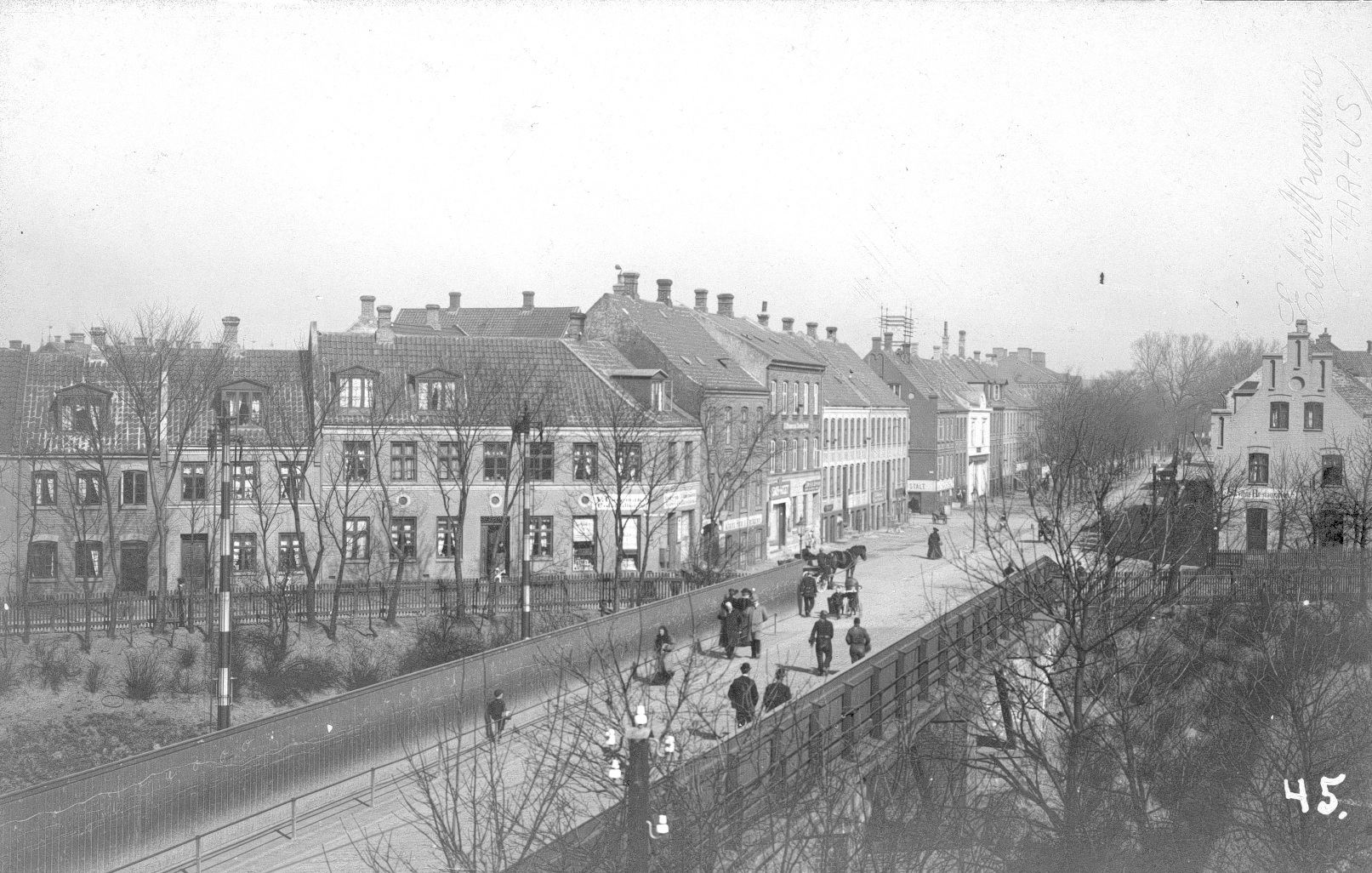 Frederiksbroen (på Frederiks Allé) i Aarhus, Danmark ca. 1920, Edvard Monsrud, Aarhus Kommunes Biblioteker, Lokalhistorisk Samling